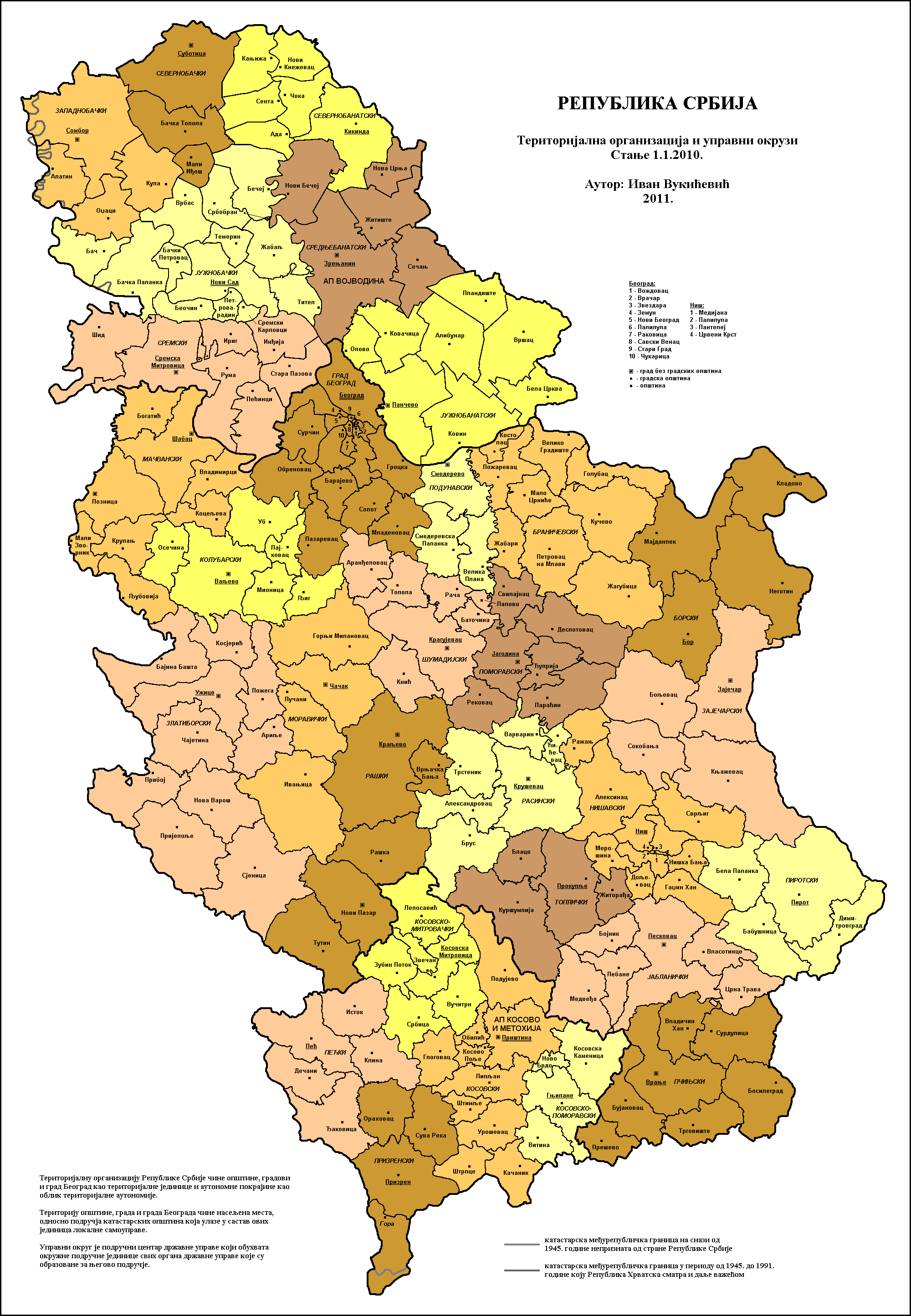 Територијална организација и управни окрузи у Србији 2010. године. Аутор: Иван Вукићевић